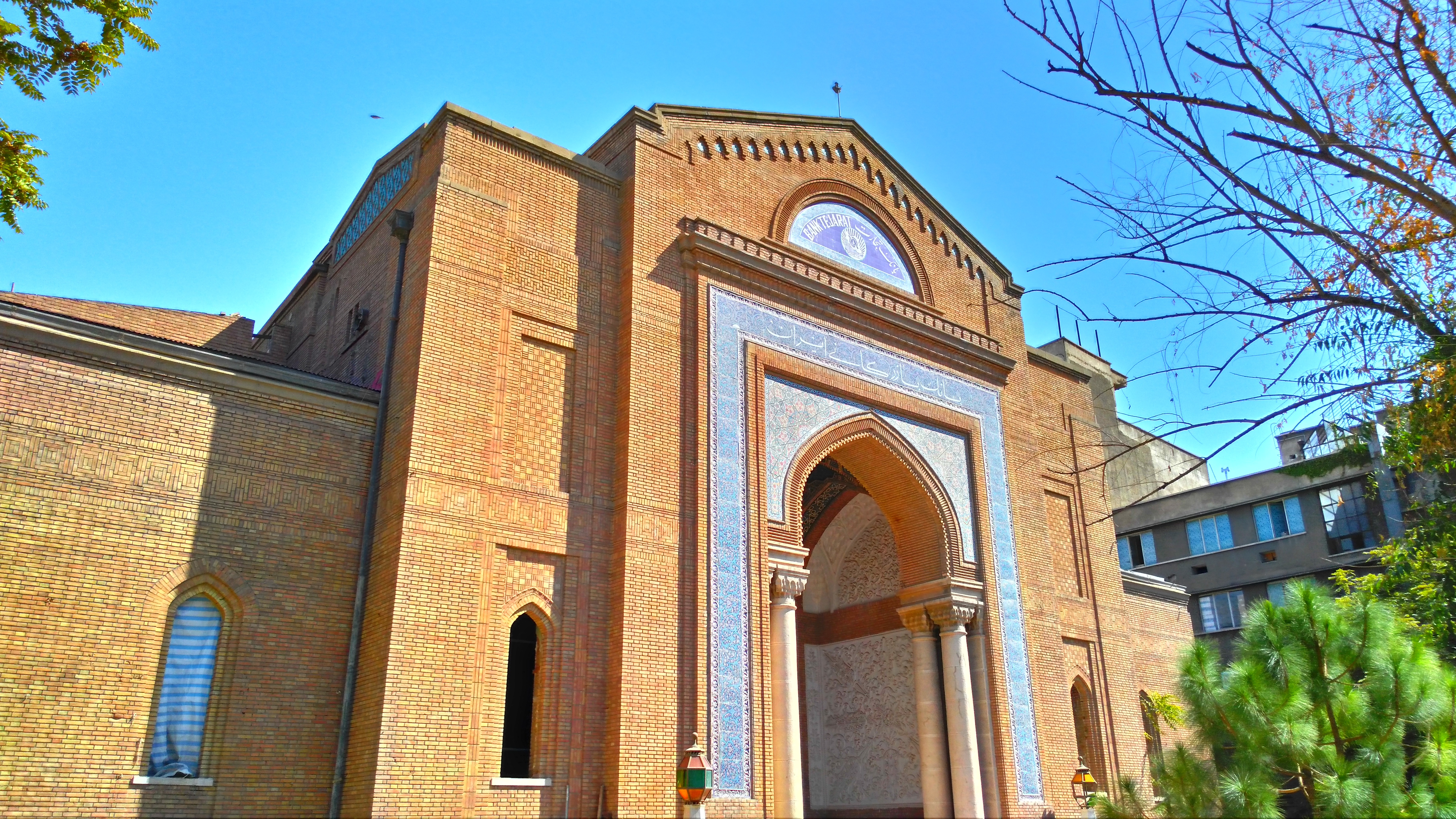 ساختمان بانک شاهی